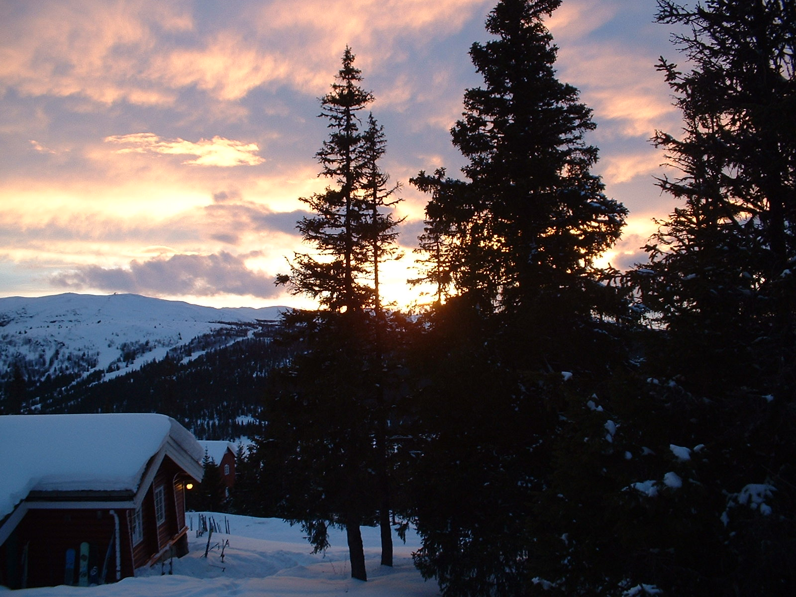 Sunset at Gålå / Norway